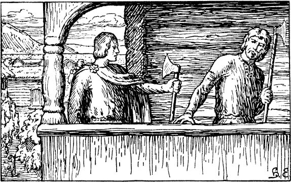 Halfdan Egedius: Illustration for Magnus den godes saga. Snorre 1899-edition. «Tag heller min Øx.» nb: «Ta heller mi øks.» nn: «Ta heller øksa mi.»